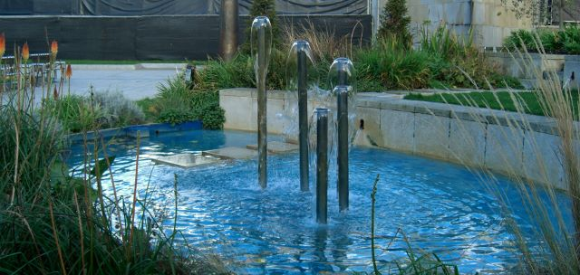 Bassin des Jardins avec les sculptures rejetant l'eau symbolisant la vie et l'optimisme